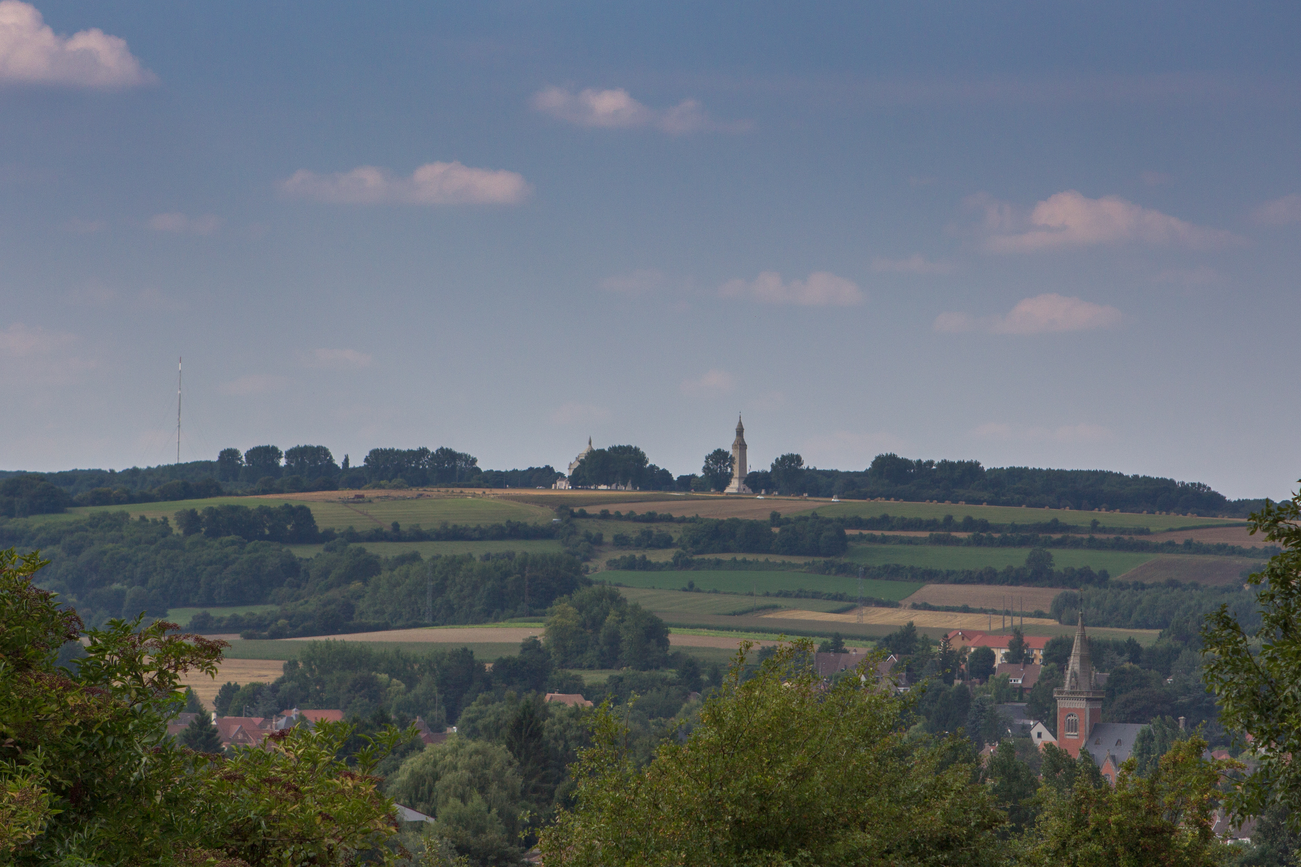 Nécropole nationale de Notre-Dame-de-Lorette (vue depuis les hauteurs de Souchez) / Ablain-Saint-Nazaire, Pas-de-Calais, France